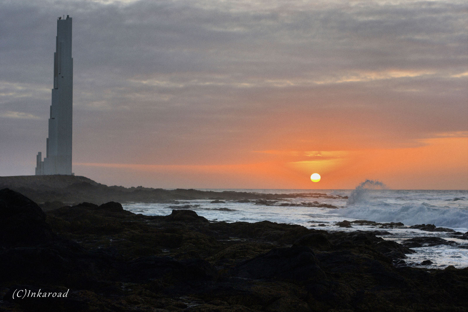 Faro de la Punta del Hidalgo, zona del norte de Tenerife